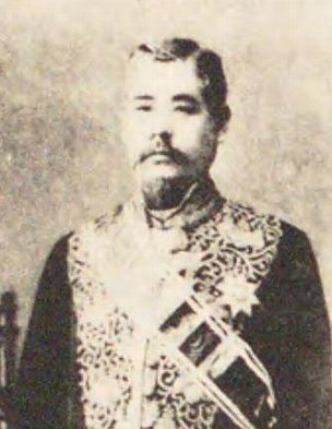 西村捨三（1843-1908）